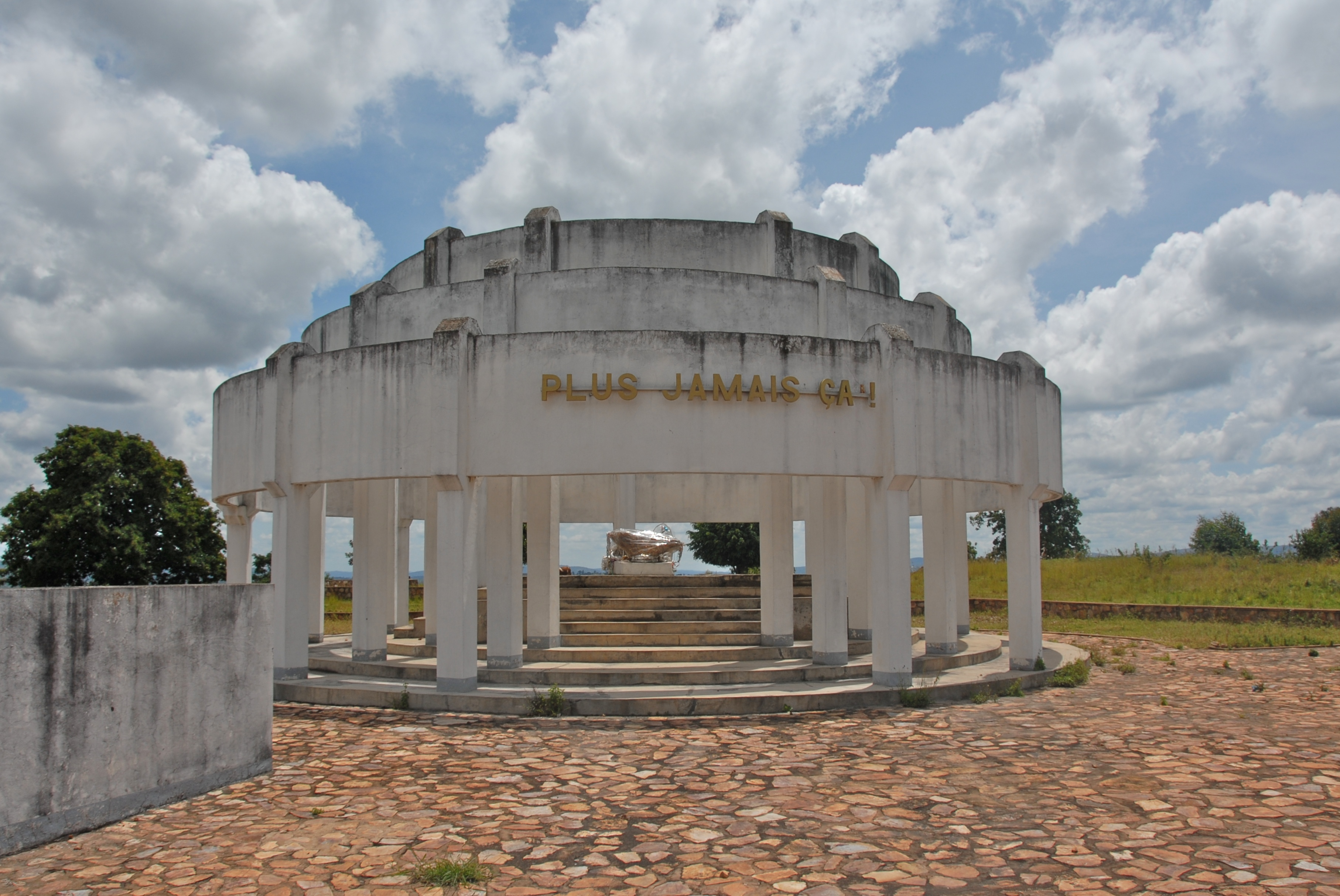 Kibimba School Memorial